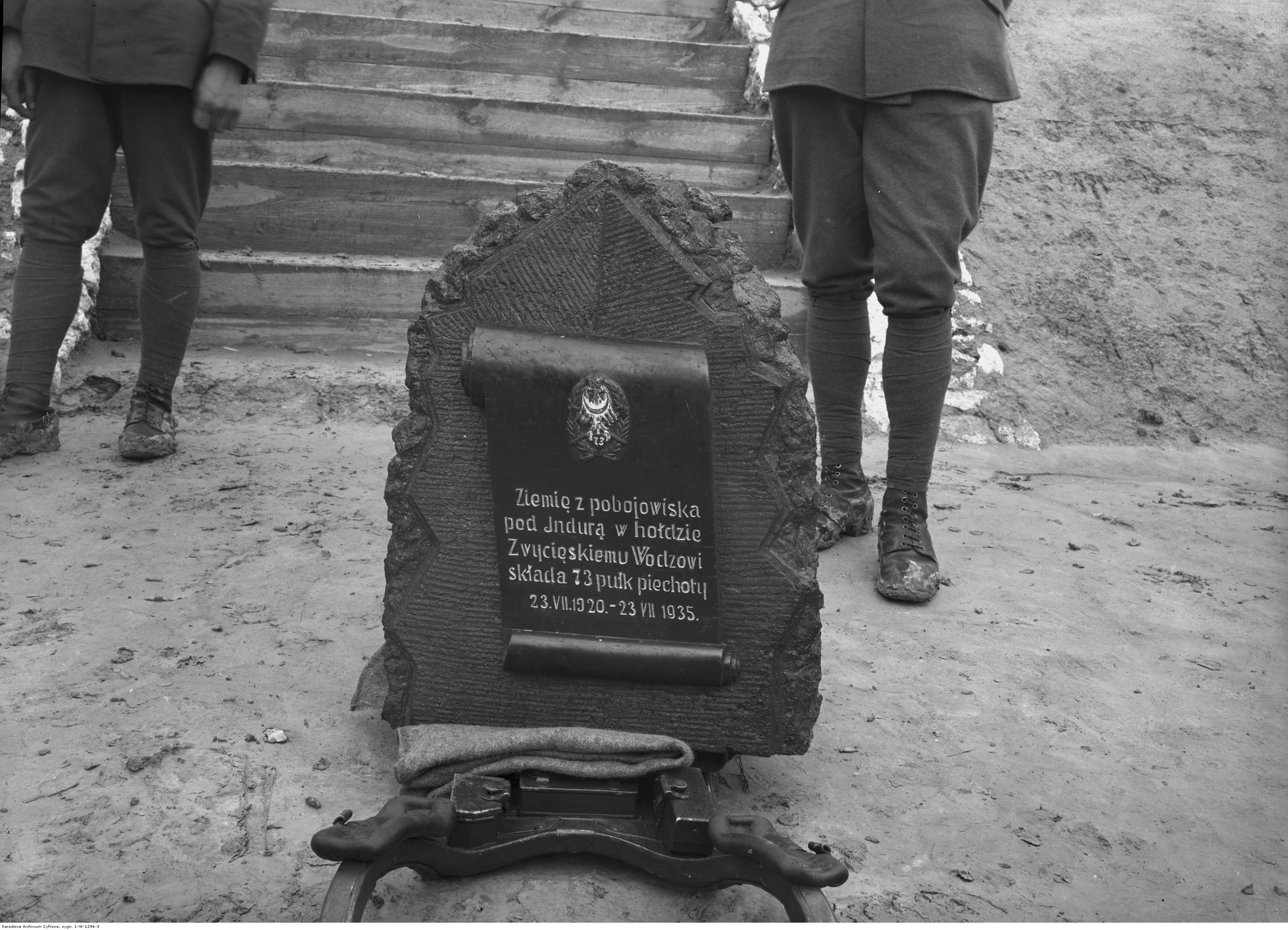 Delegacja 73 pułku piechoty w Krakowie. Urna z ziemią z bitwy pod Indurą, w której brał udział 73 pułk piechoty, przyniesiona przez żołnierzy na Sowiniec; Kraków 1935. Koncern Ilustrowany Kurier Codzienny - Archiwum Ilustracji. Sygnatura: 1-W-1296-3